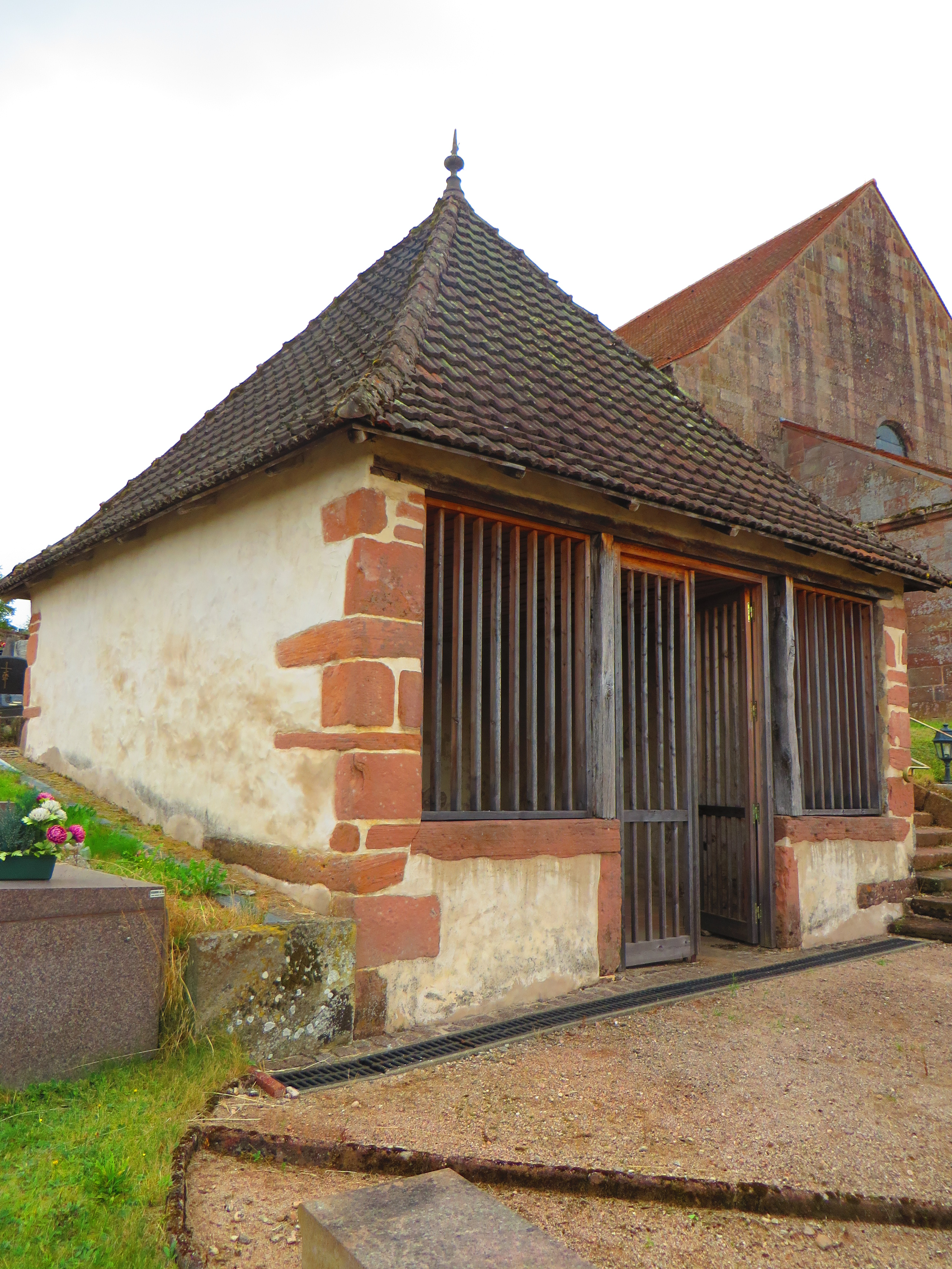 Champ le Duc oratoire chapelle